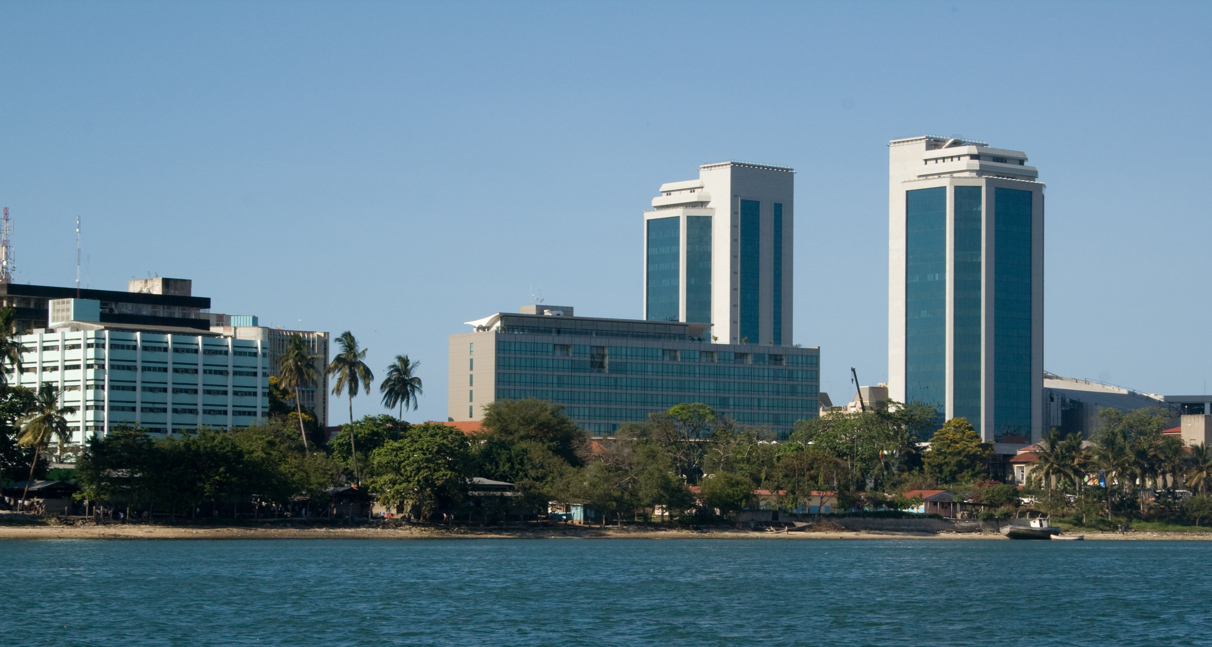 Bank of Tanzania in Dar es Salaam.